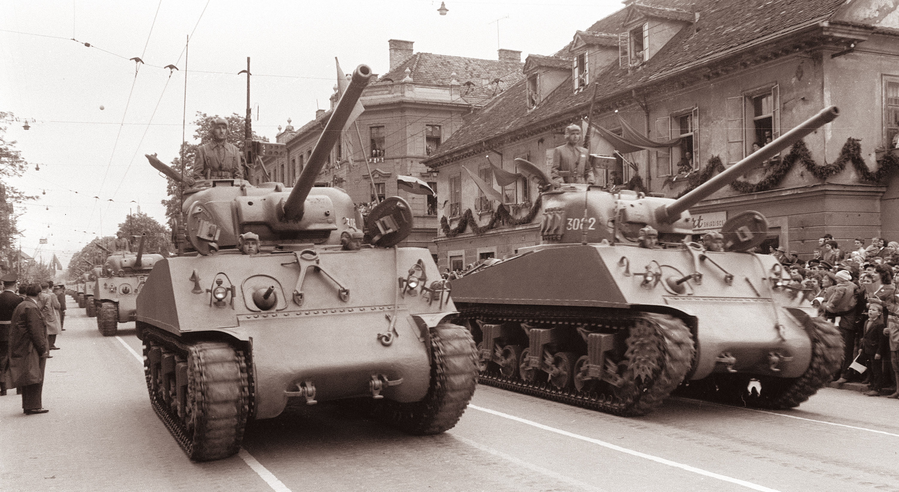 Prvomajski sprevod v Ljubljani